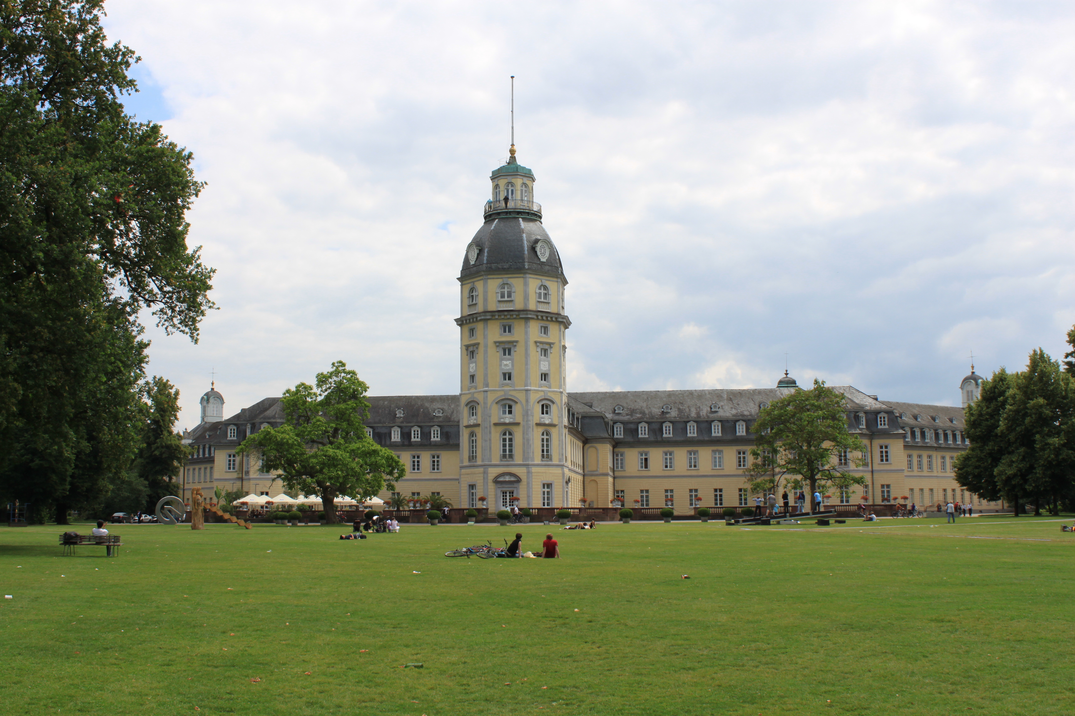 Karlsruhe, Allemagne